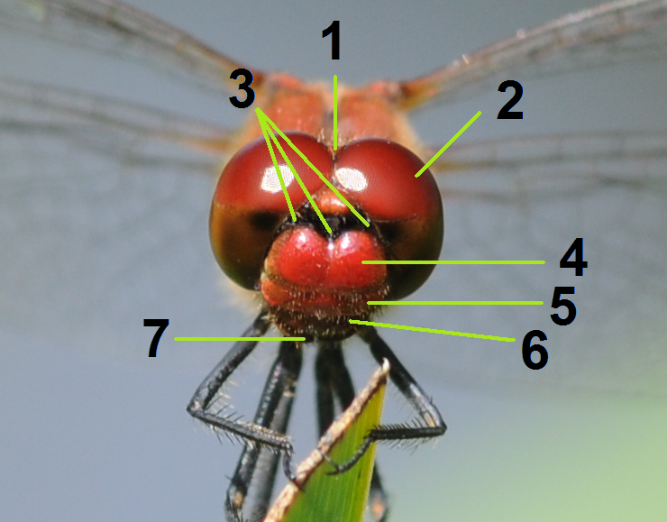 Sympétrum rouge sang